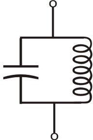 Párhuzamosan kapcsolt kondenzátor és tekercs